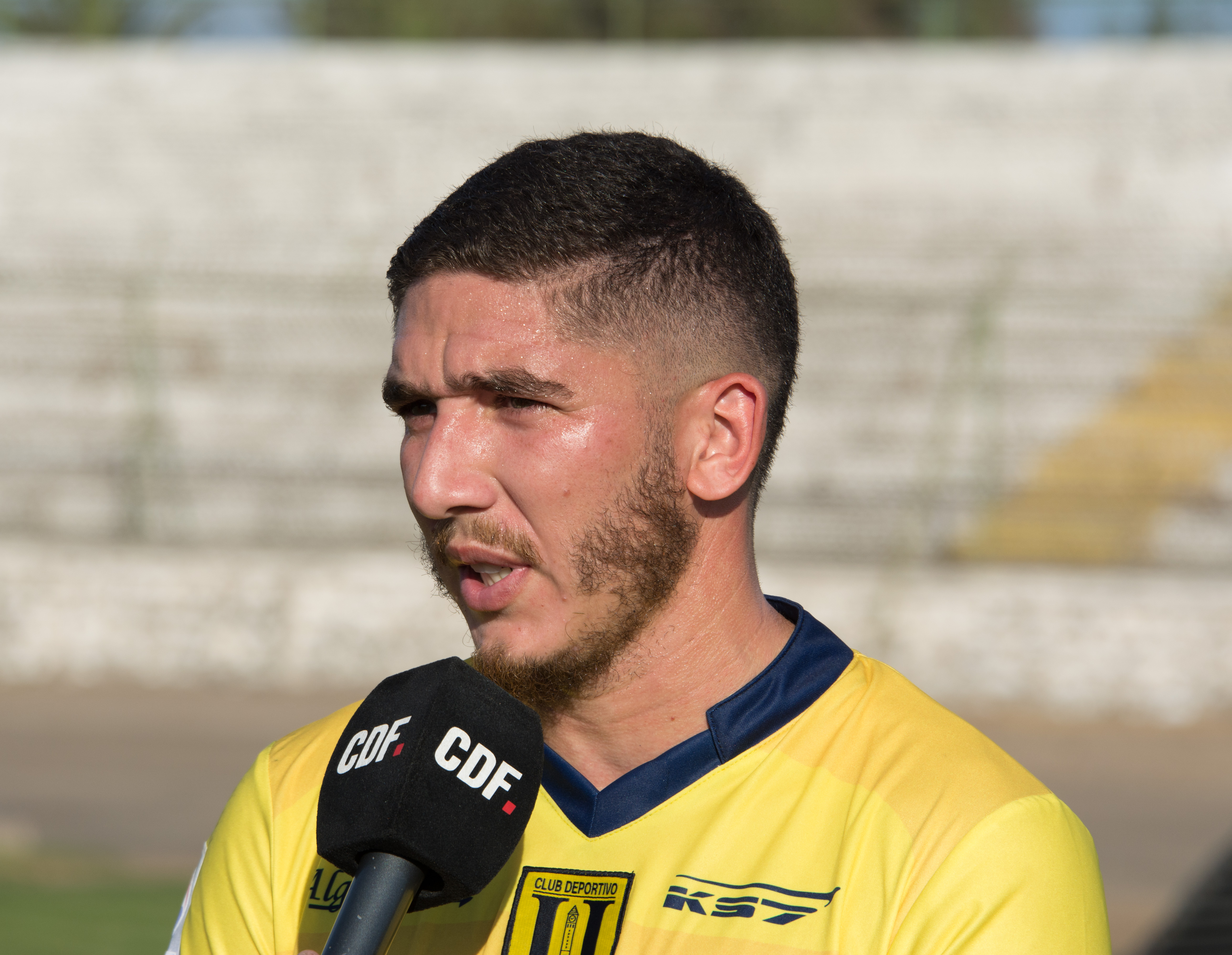 Santiago Silva Gerez, Palestino v Universidad de Concepción, Estadio Municipal de La Cisterna, La Cisterna, Santiago, Chile.